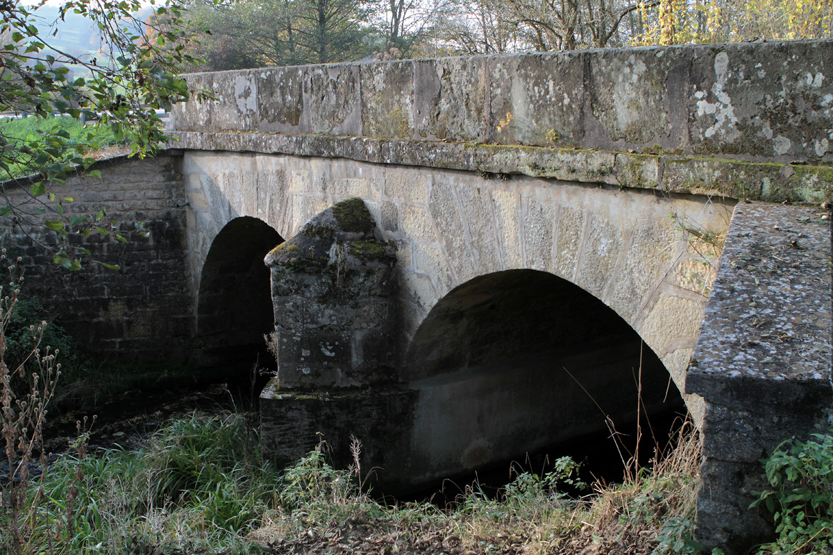 Pont de la D158a sur la Petite Amance entre les communes de Terre-Natale et Coiffy-le-Bas